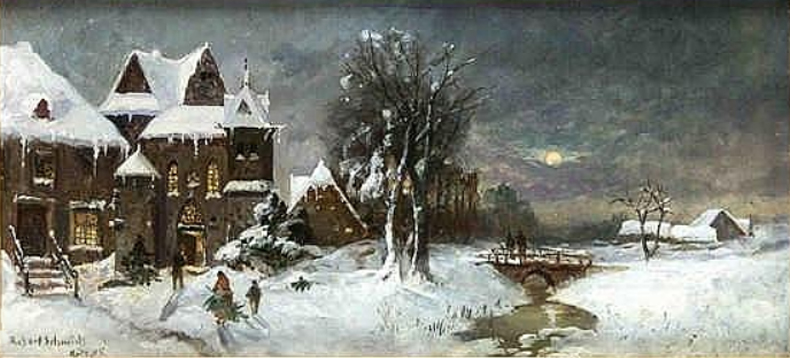 Winterlandschaft mit einer Familie, die einen Weihnachtsbaum trägt, auf dem Weg zu einer Kapelle